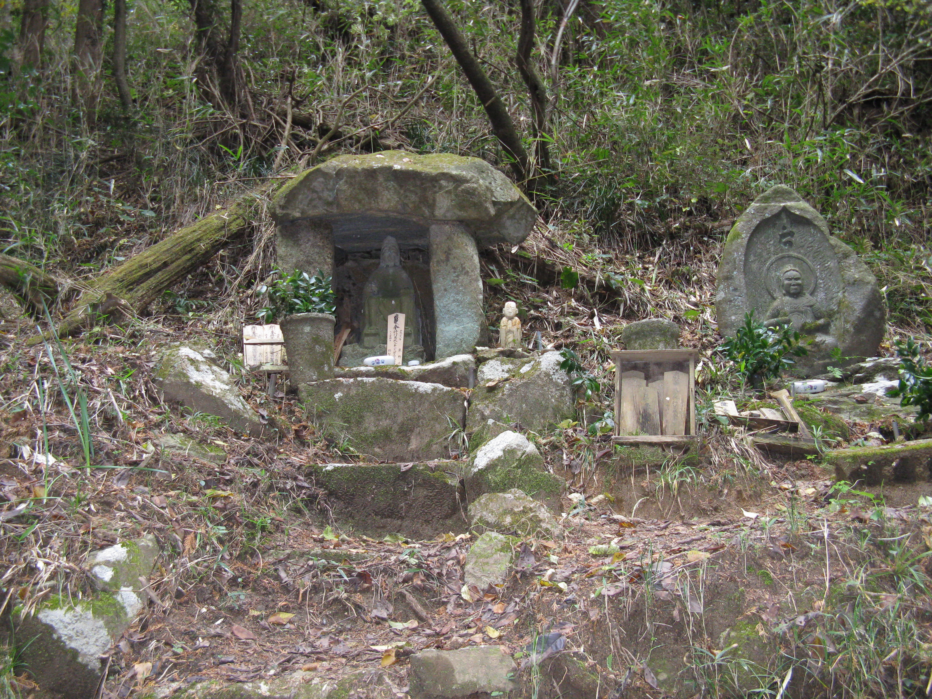 平石峠にある葛城二十八宿第二十四番経塚